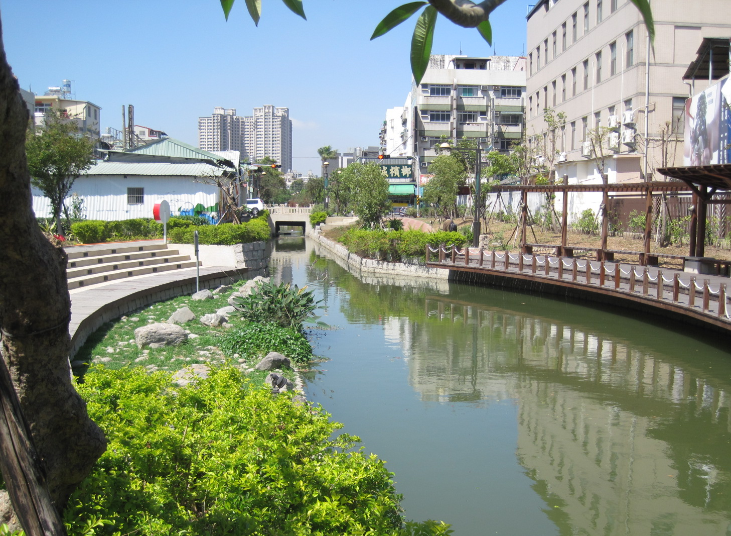 中文（台灣）: 鳳山曹公圳位在曹公廟附近的部分。